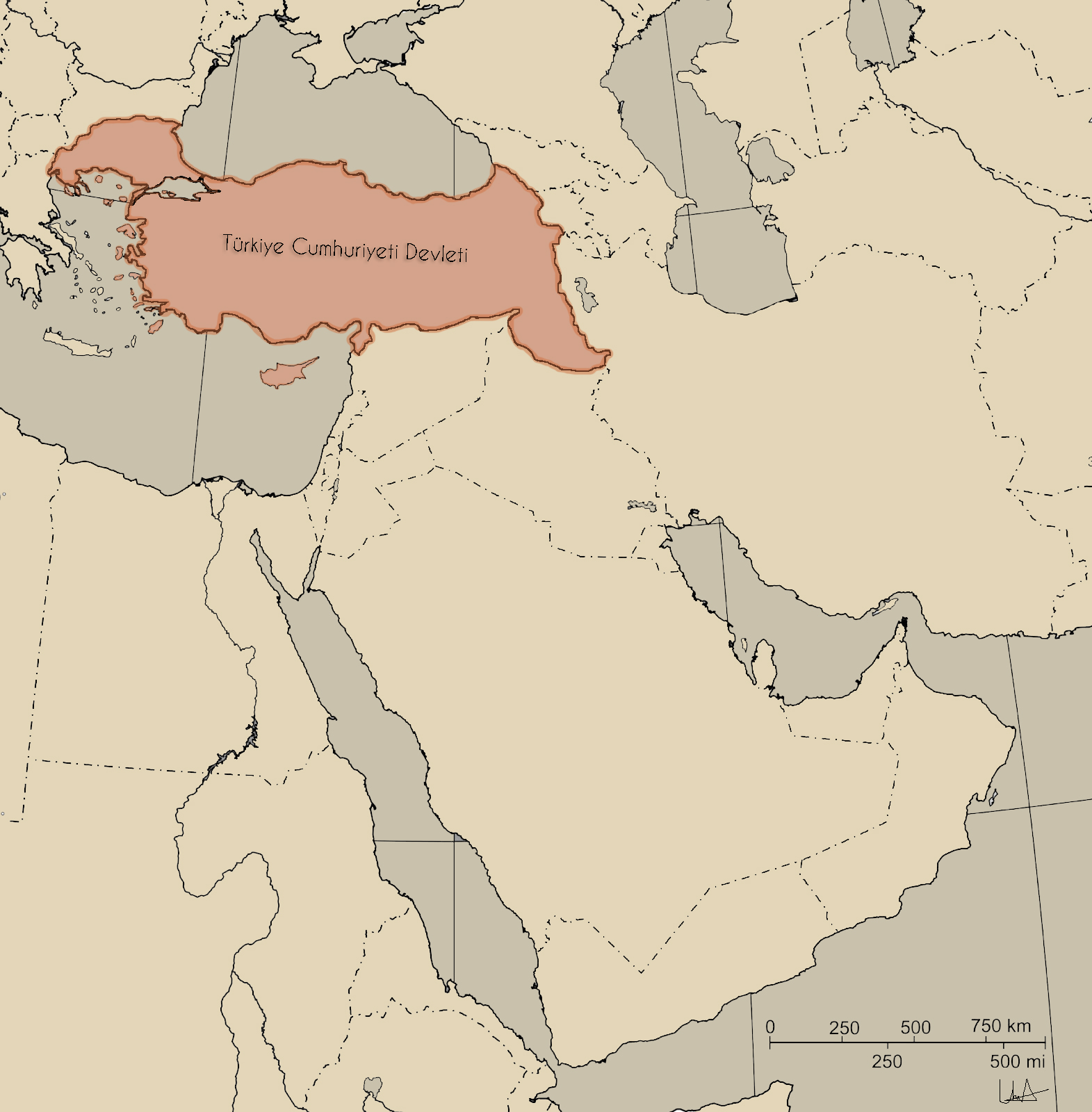 Orta Doğu ve Balkanlar'da Misak-ı Millî Türkiye'sinin konumunu gösterdiği ileri sürülen bir harita.